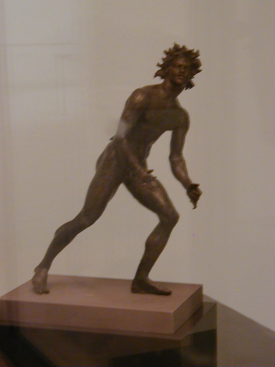 Satyre prêt à s'élancer, bronze, IIe-Ie siècle av. J.-C., fouilles sous-marines de Mahdia, Musée du Bardo, Tunisie.